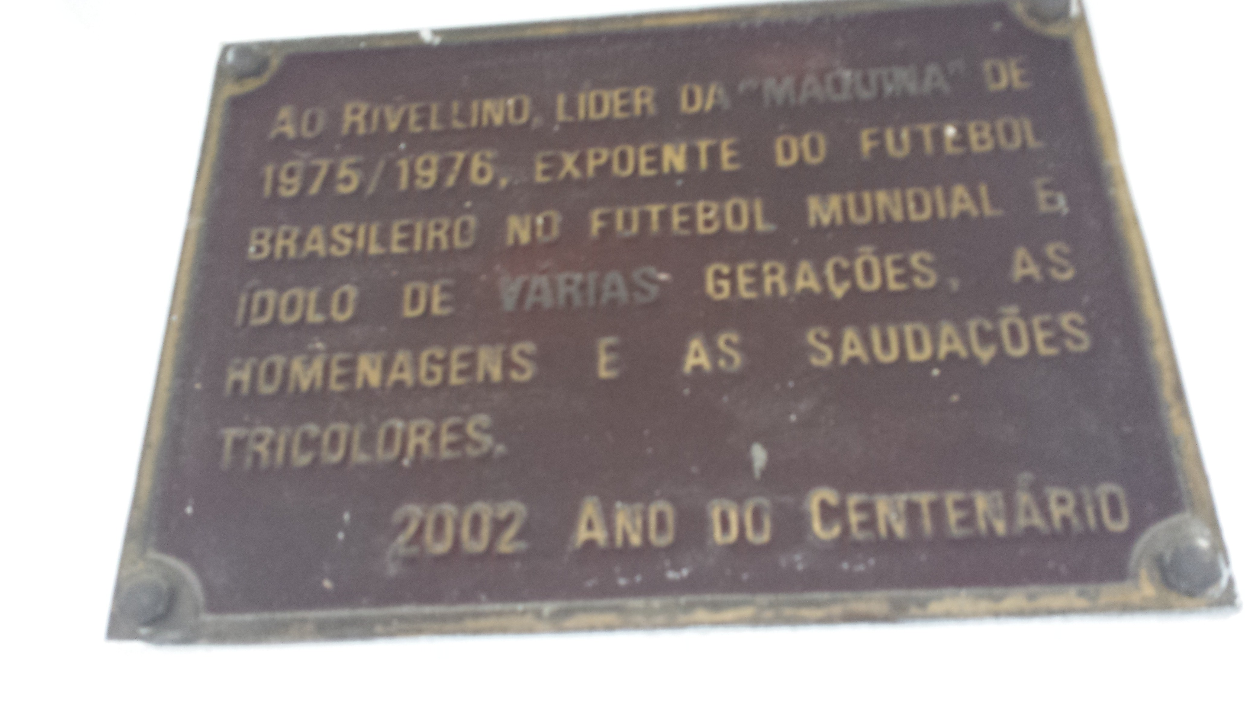 Placa para Rivellino no Estádio de Laranjeiras, do Fluminense Football Club.